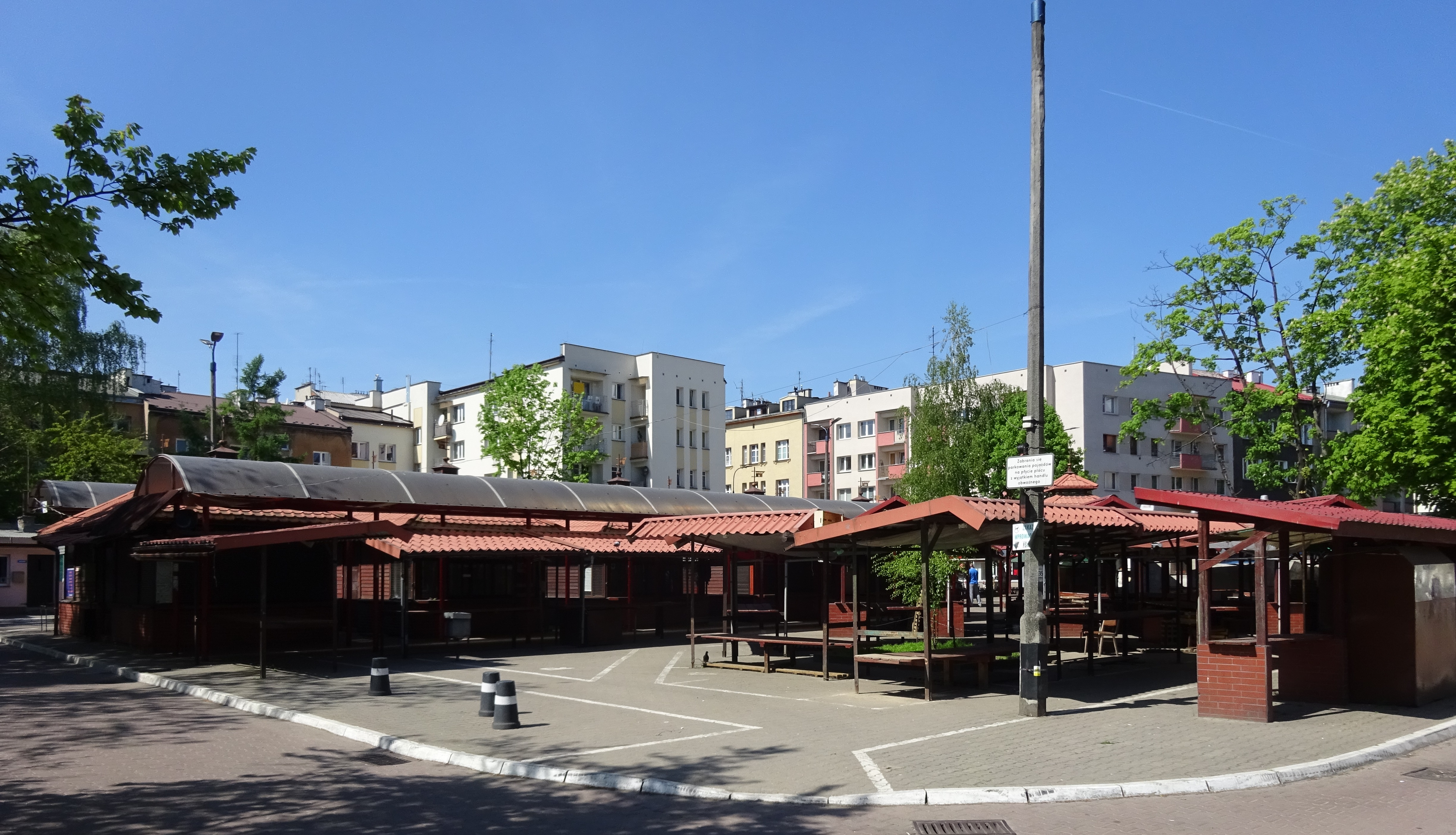 Plac Nowowiejski w Krakowie. Centralny plac dawnej wsi Nowa Wieś Narodowa, później dzielnicy i osiedla Krakowa. 2018